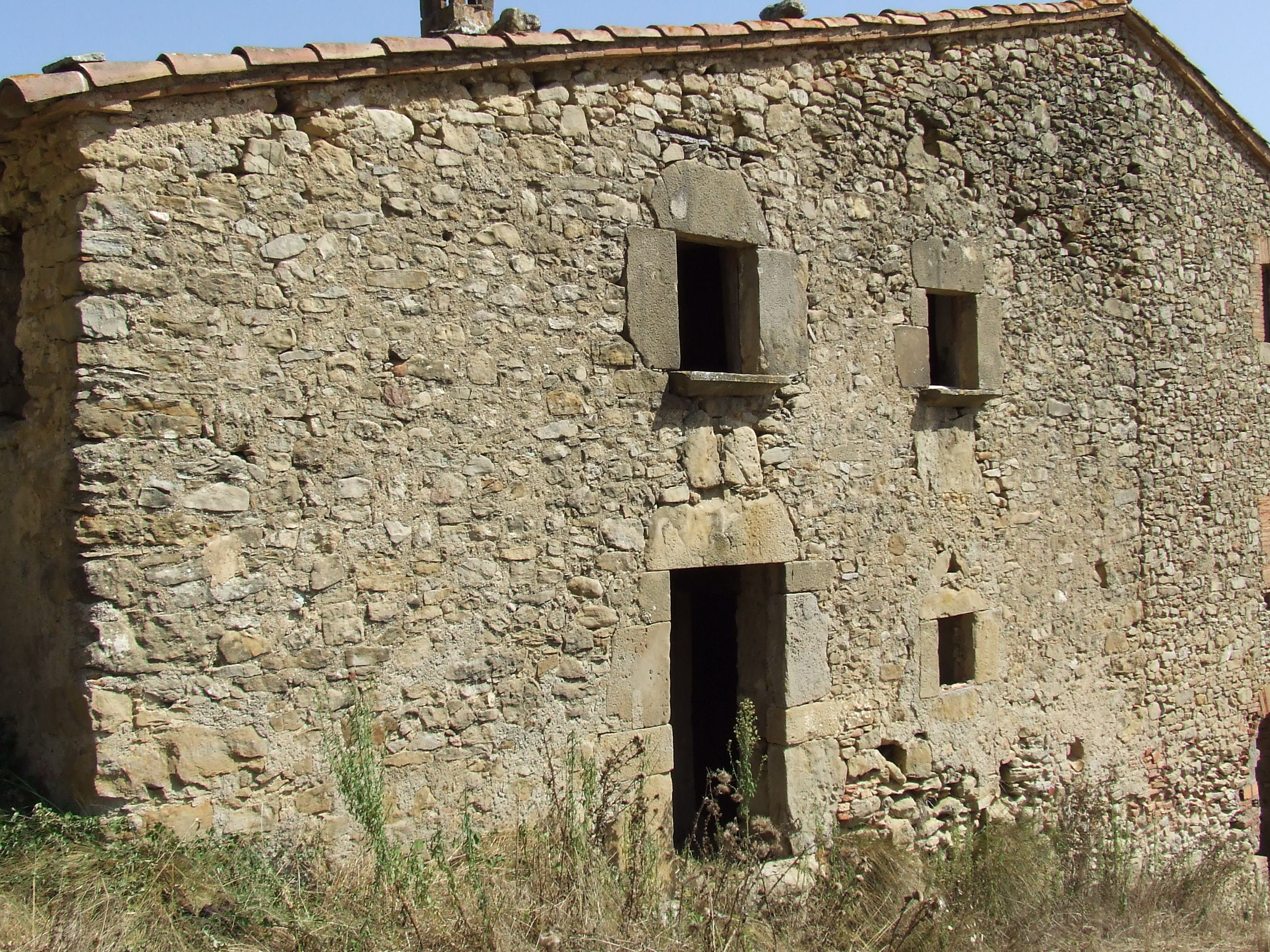 Cal Fantasia (Castellcir, Moianès)